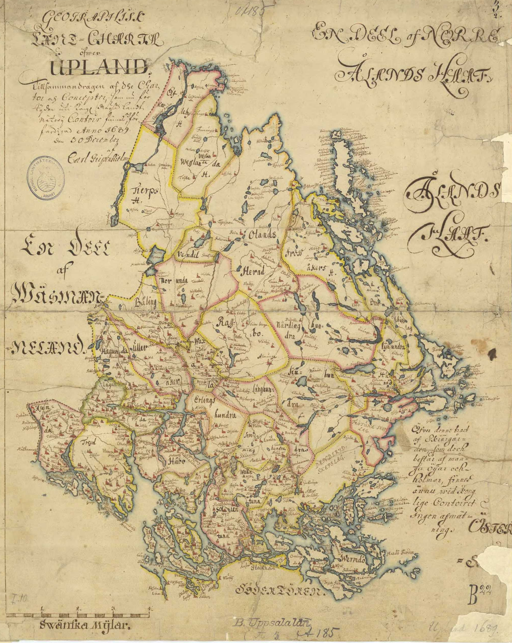 Äldre karta över Uppland.